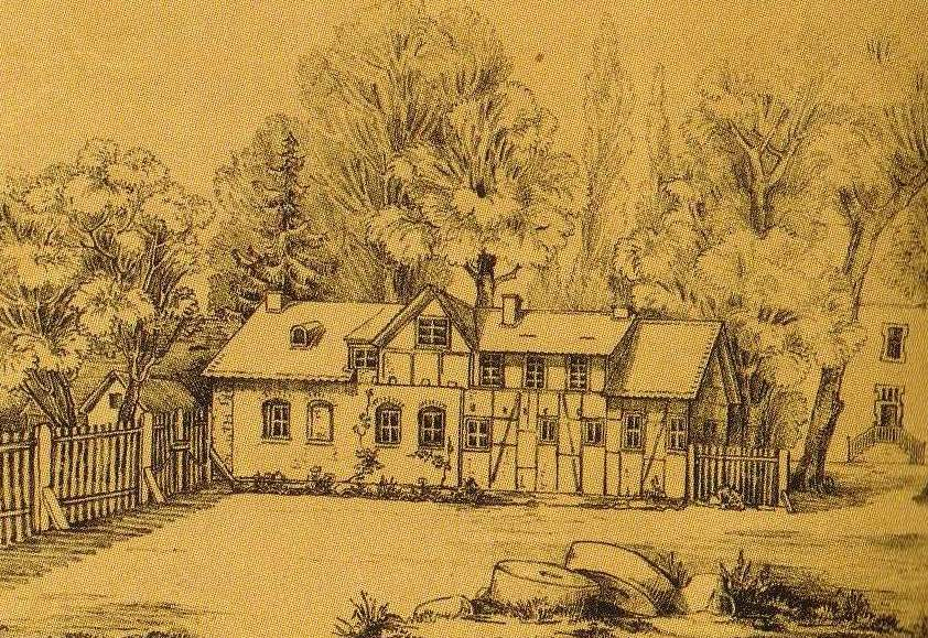 Zeichnung des Rettungshauses in Althaldensleben